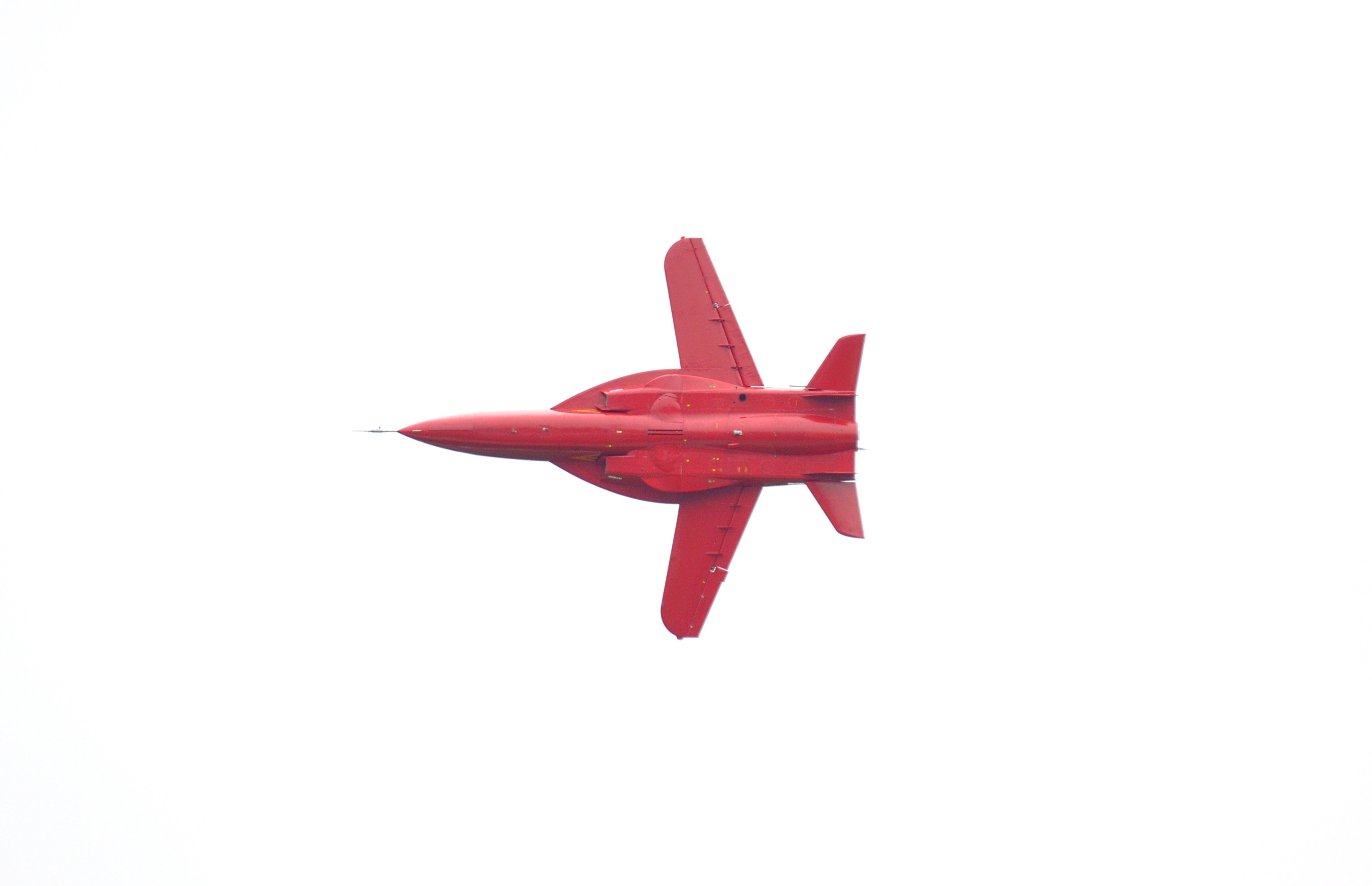 Der einzige Prototyp der SAT SR-10 im Flug auf der MAKS 2017